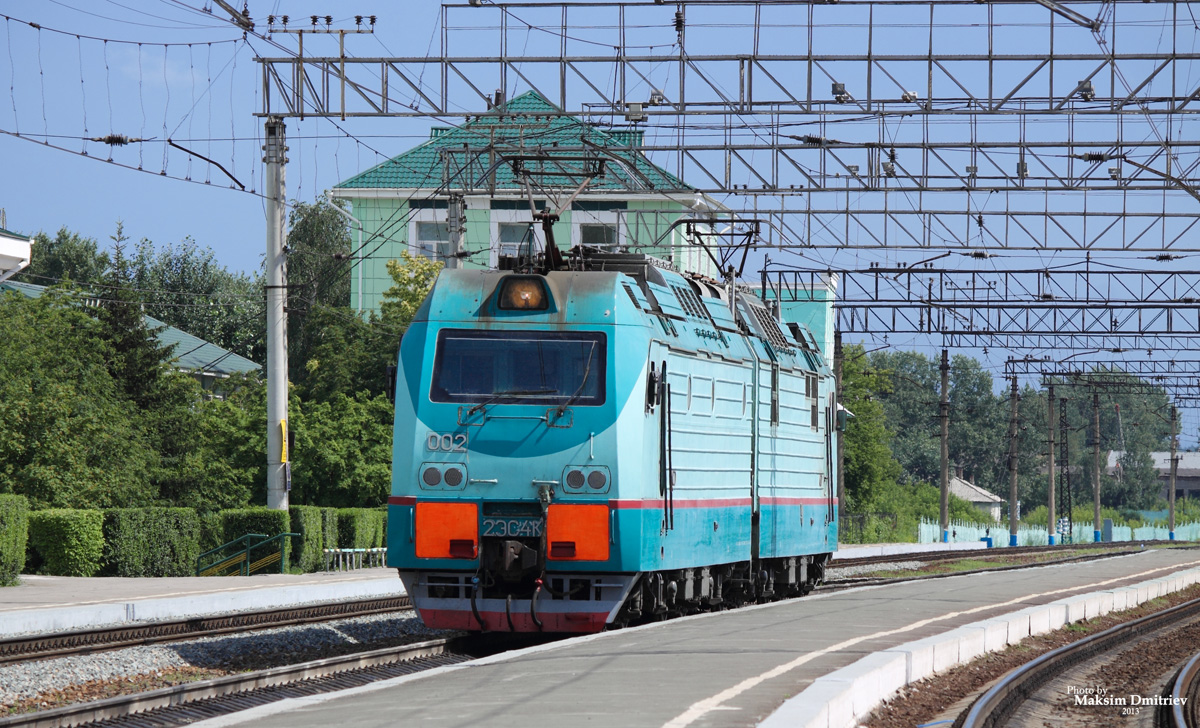 2ЭС4К-002 Россия, Новосибирская область, станция Инская